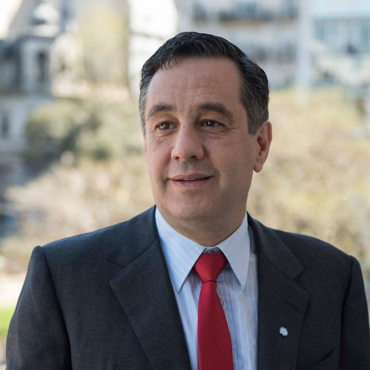 Alejandro Finocchiaro